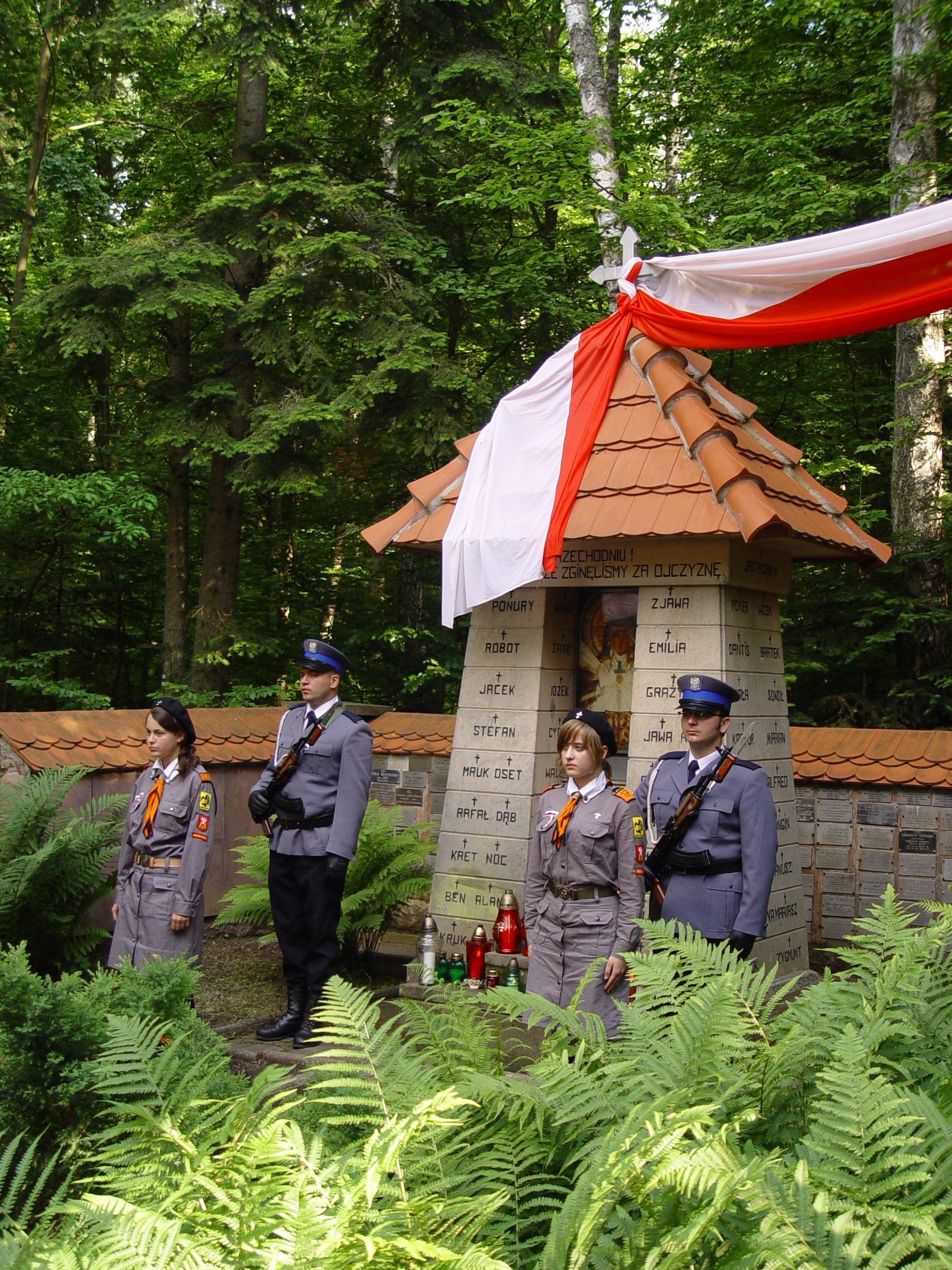 Wykus - warta honorowa podczas uroczystości rocznicowych 14 lipca 2008 r.